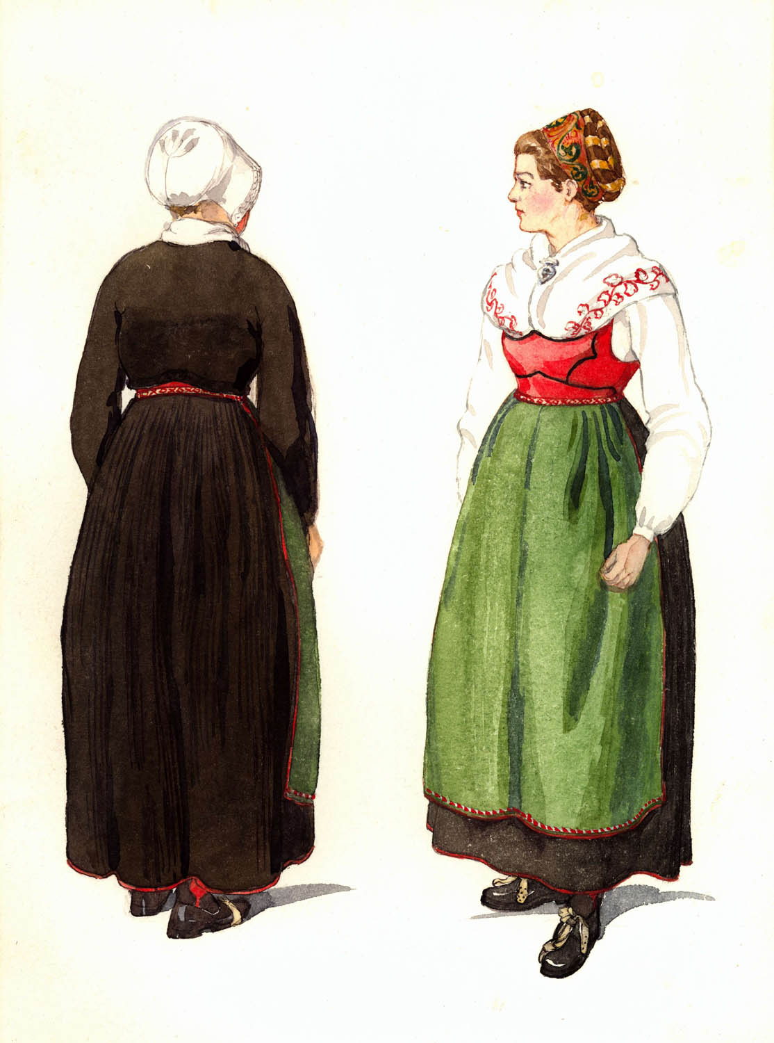 Folkdräkt, helgdagsdräkt, Ny socken, Värmland. Kvinnodräkt. Akvarell av Emelie von Walterstorff.